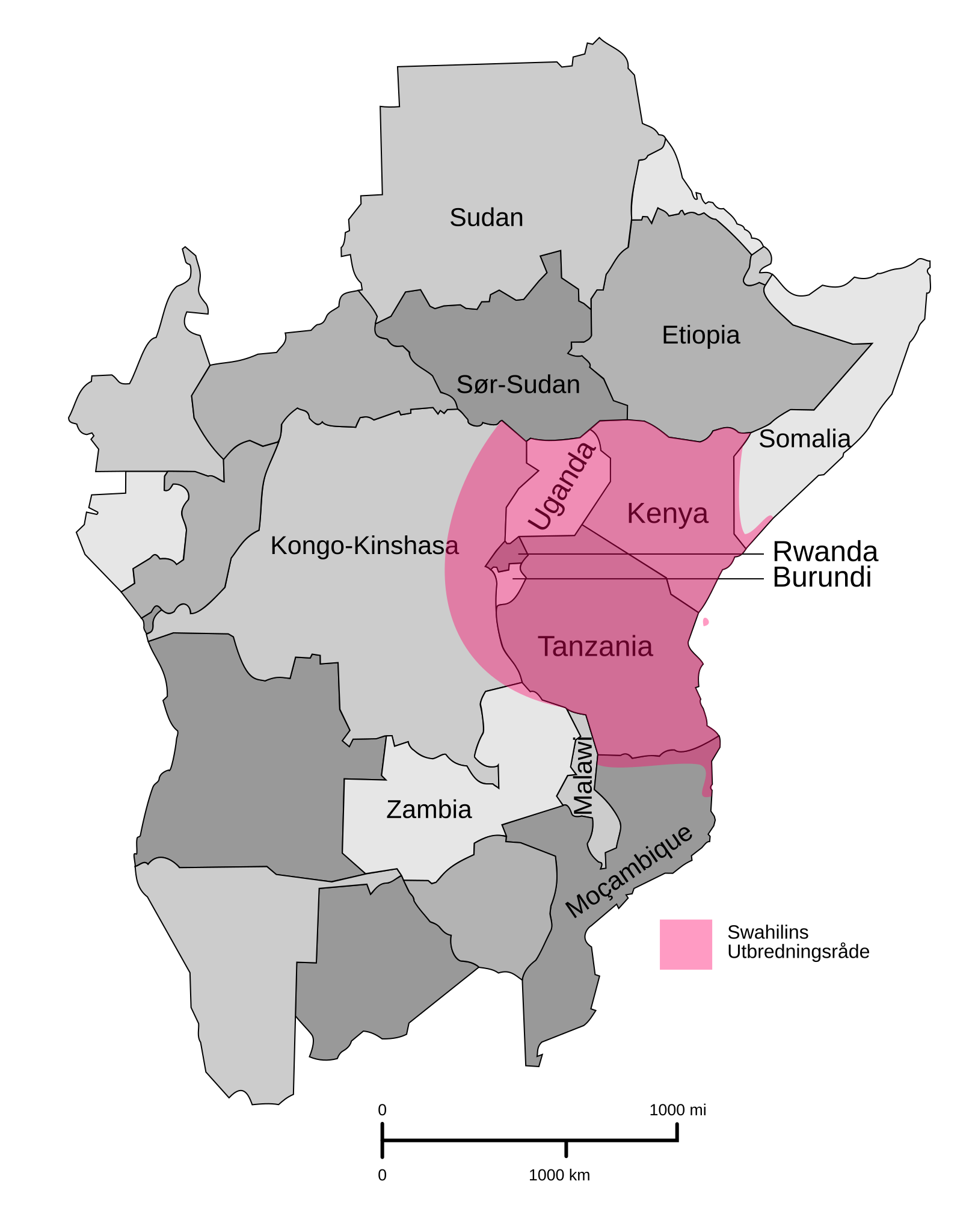 Swahilins utbredningsområde, from Image:Swahili.svg by User:Slashme